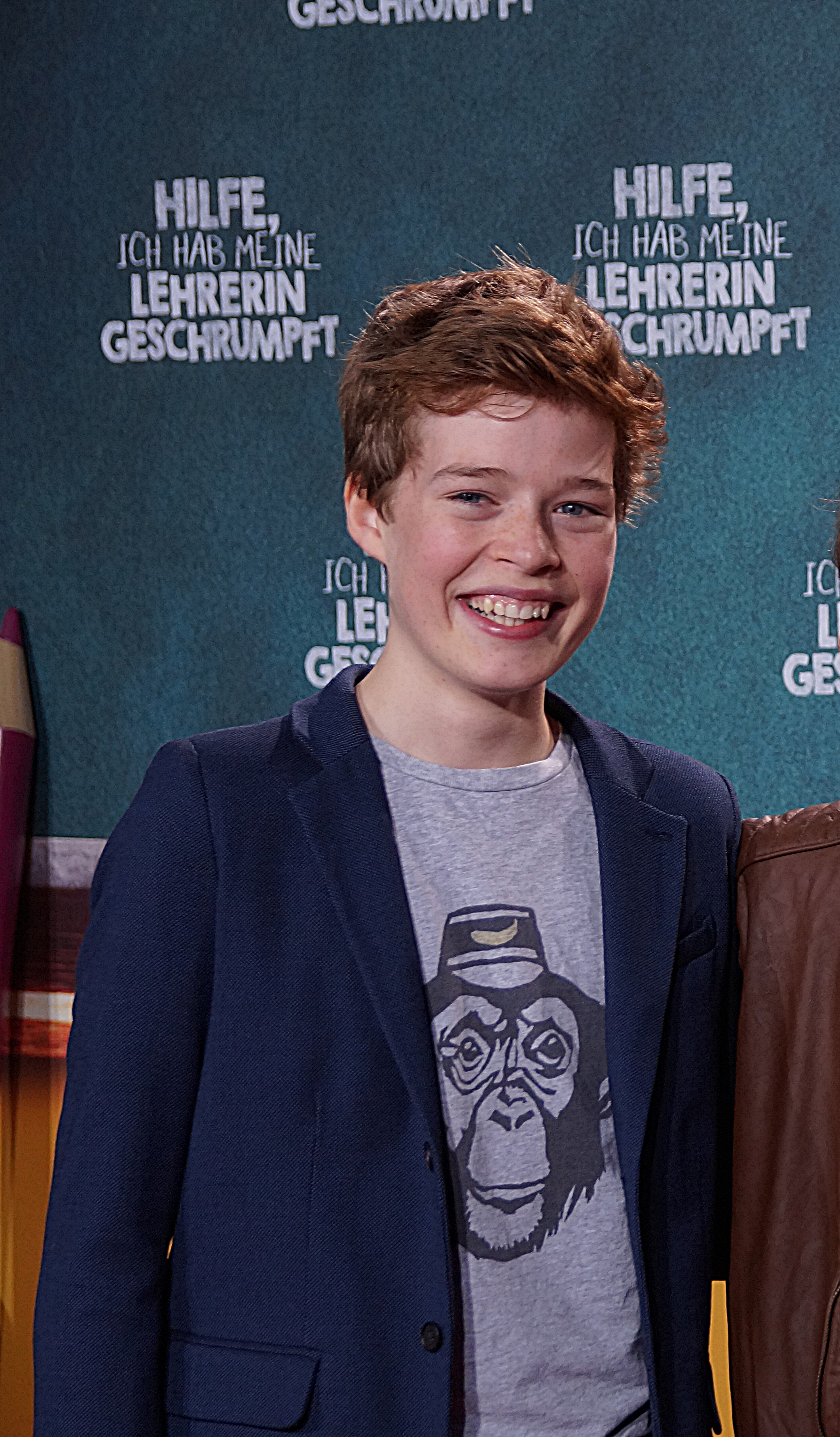 Georg Sulzer bei der Premiere von "Hilfe, ich habe meine Lehrerin geschrumpft", im Dezember 2015